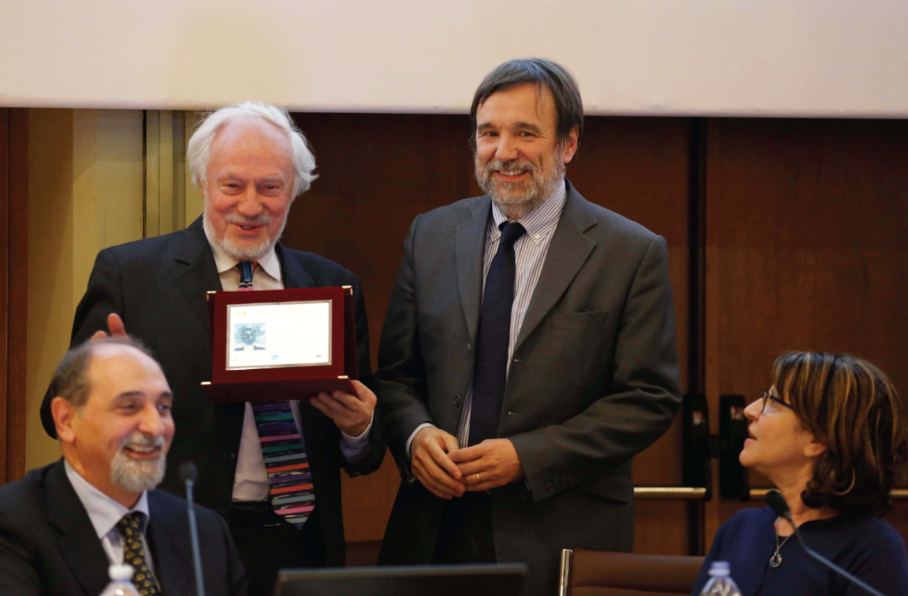 Luigi Dei riceve la menzione dal Comitato Scientifico del Premio Nazionale di Divulgazione Scientifica 2015